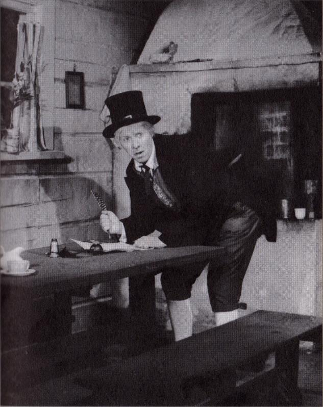 Suomalainen näyttelijä Pentti Siimes (s. 1929) Aleksis Kiven kirjoittaman näytelmän Nummisuutareiden Eskona Suomen Kansallisteatterissa 1959.